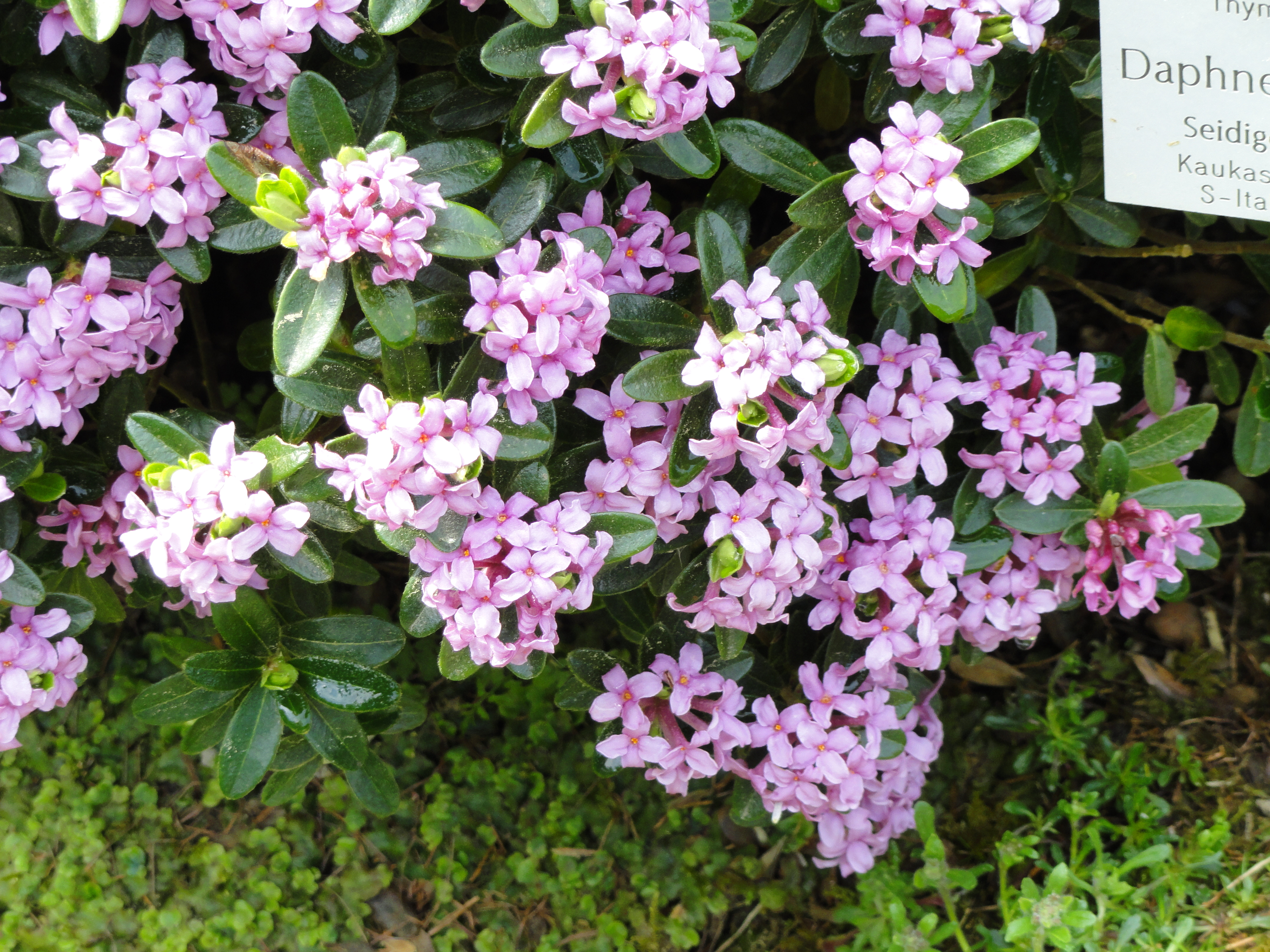 Daphne sericea specimen in the Botanischer Garten München-Nymphenburg, Munich, Germany.